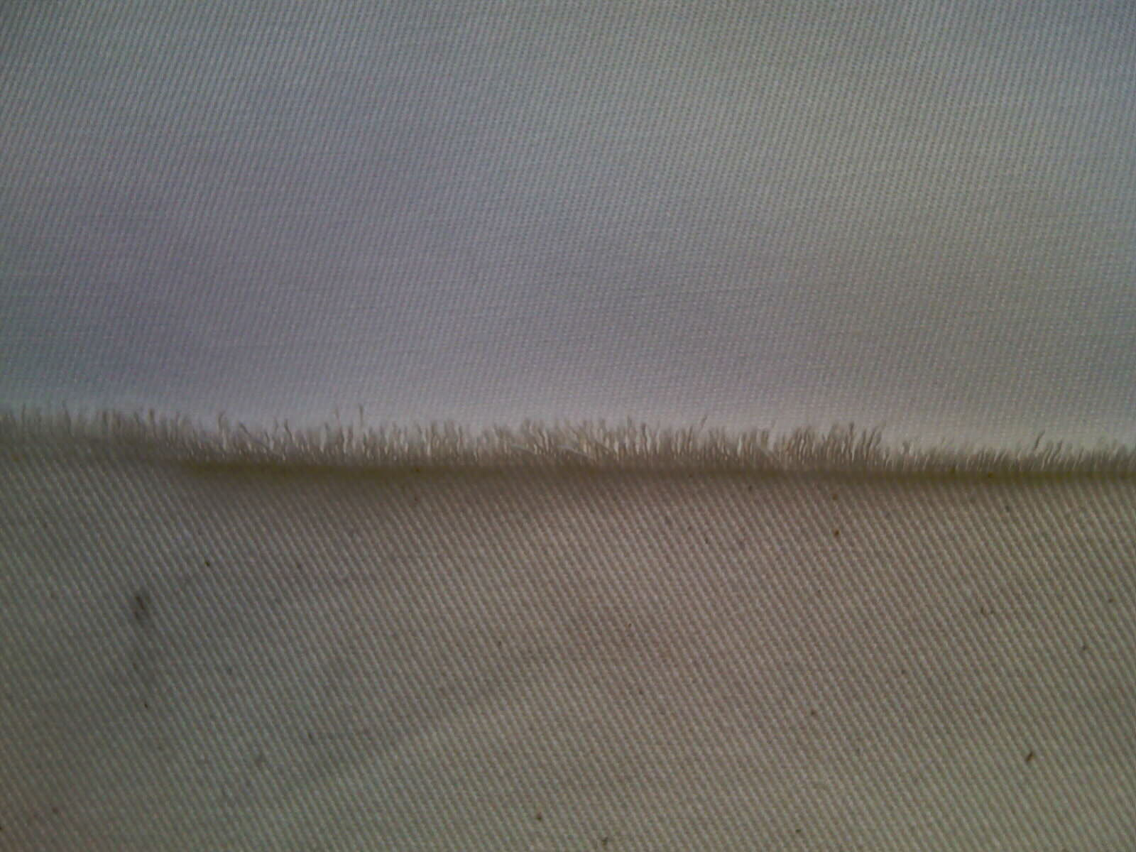 لون قماش القطن قبل وبعد القصر Licensing تصنيف:صناعة النسيج